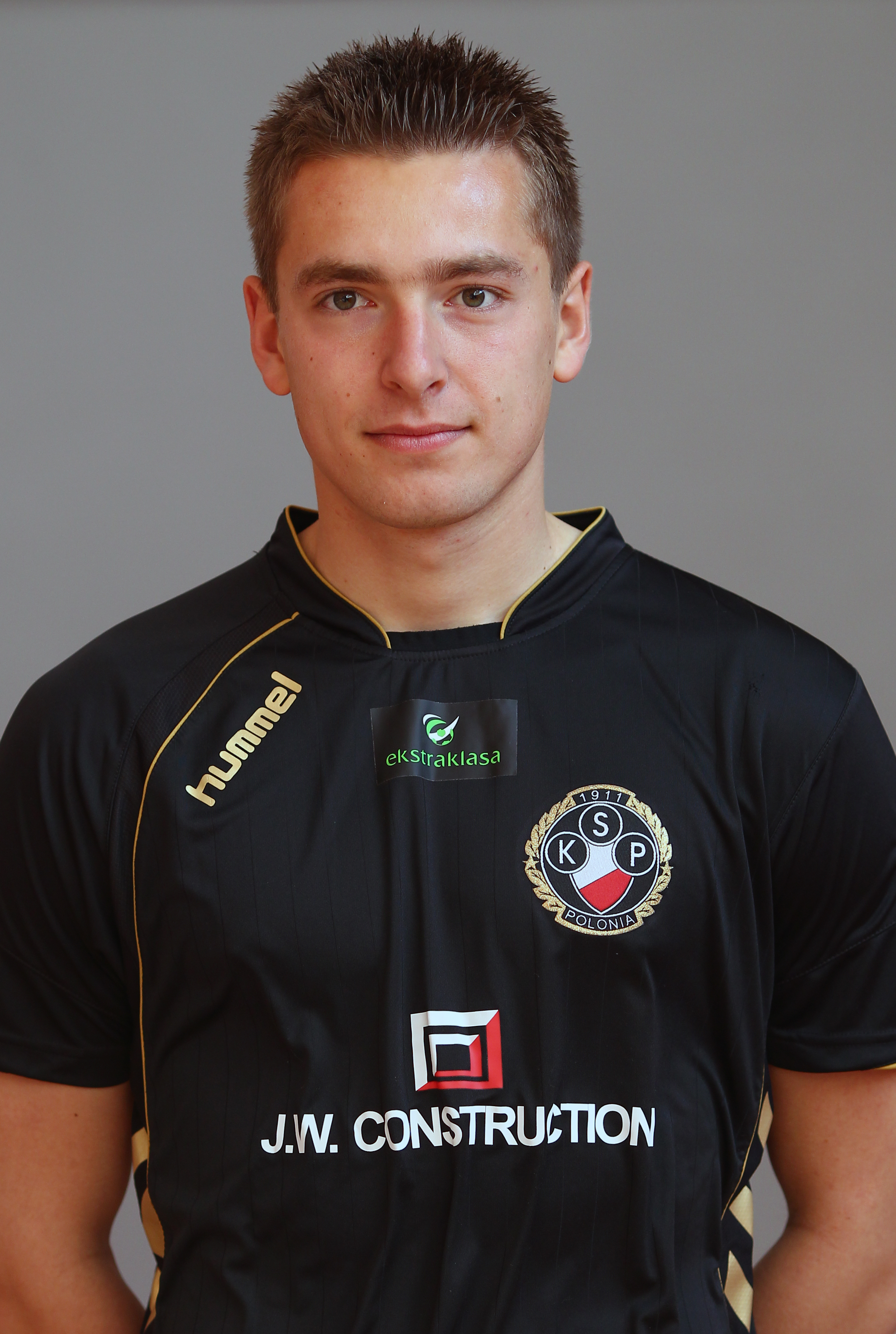 Artur Sobiech, player of Polonia Warszawa (2011)